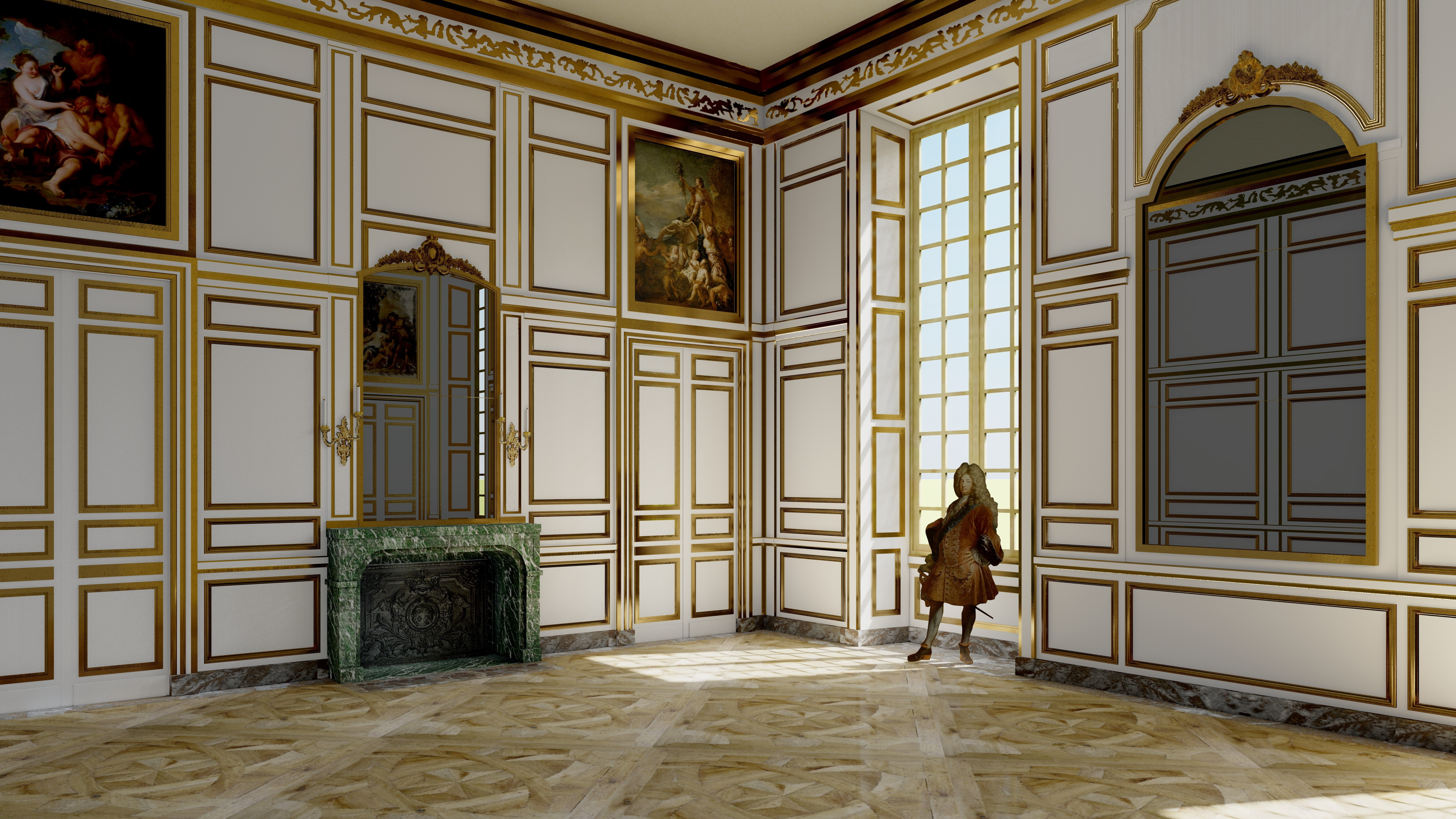 Proposition de restitution de la salle à manger de Monseigneur, rez-de-chaussée du château-vieux de Meudon, aile est. Etat vers 1700-1792.